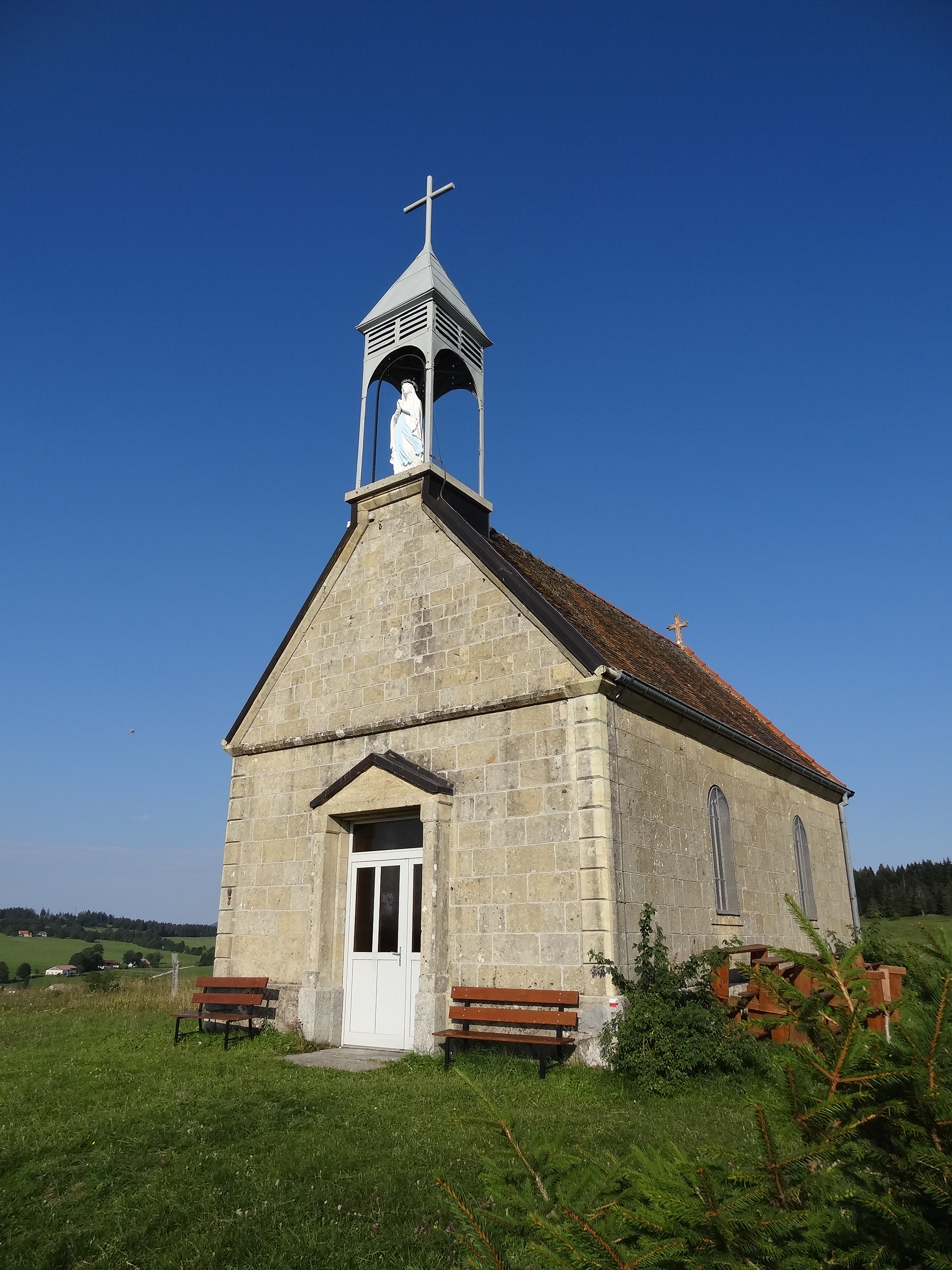 Les Fourgs (Doubs) - chapelle du Tourillot, dominant le bourg à l'est